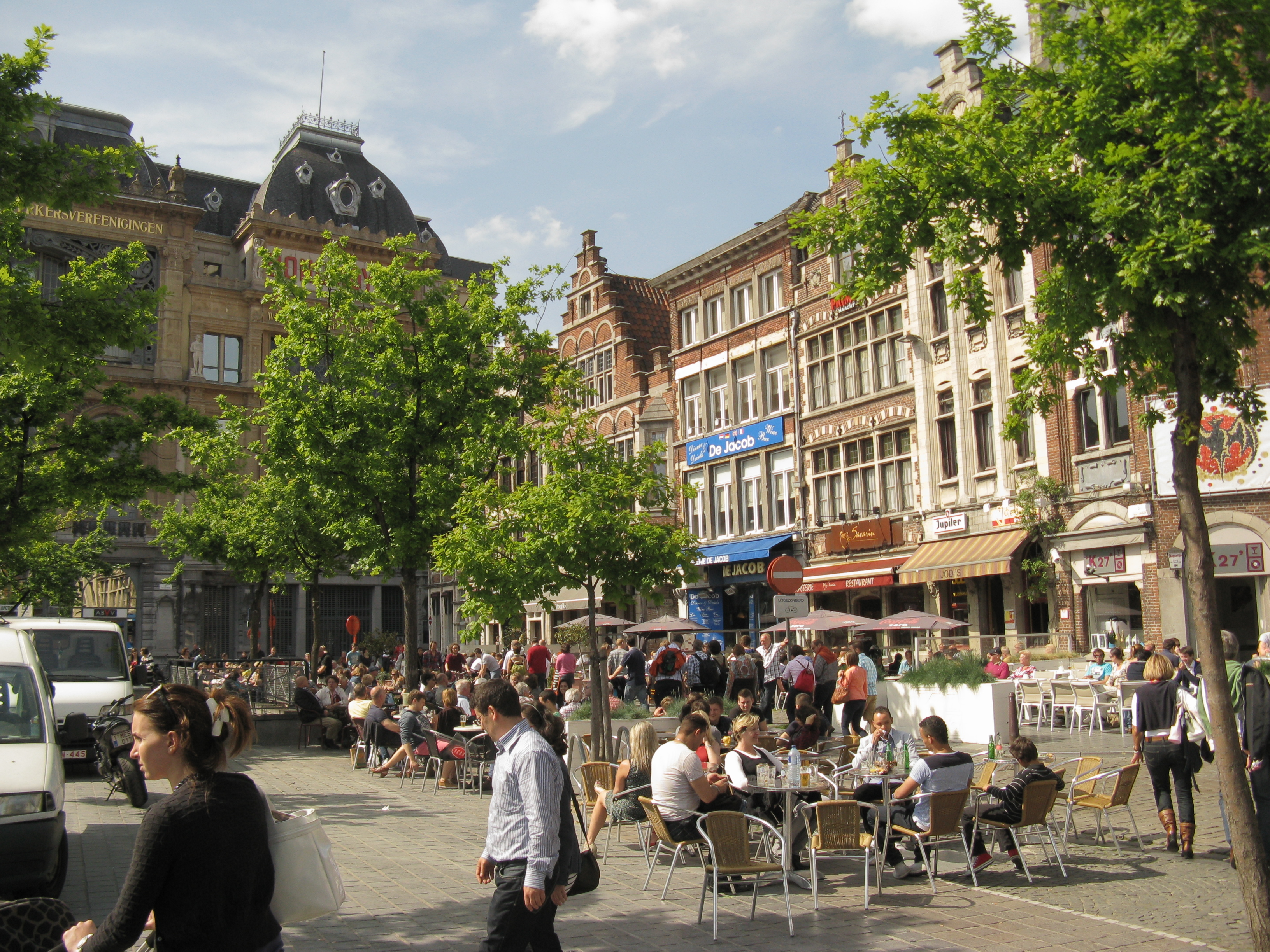 Vrijdagmarkt, Gent